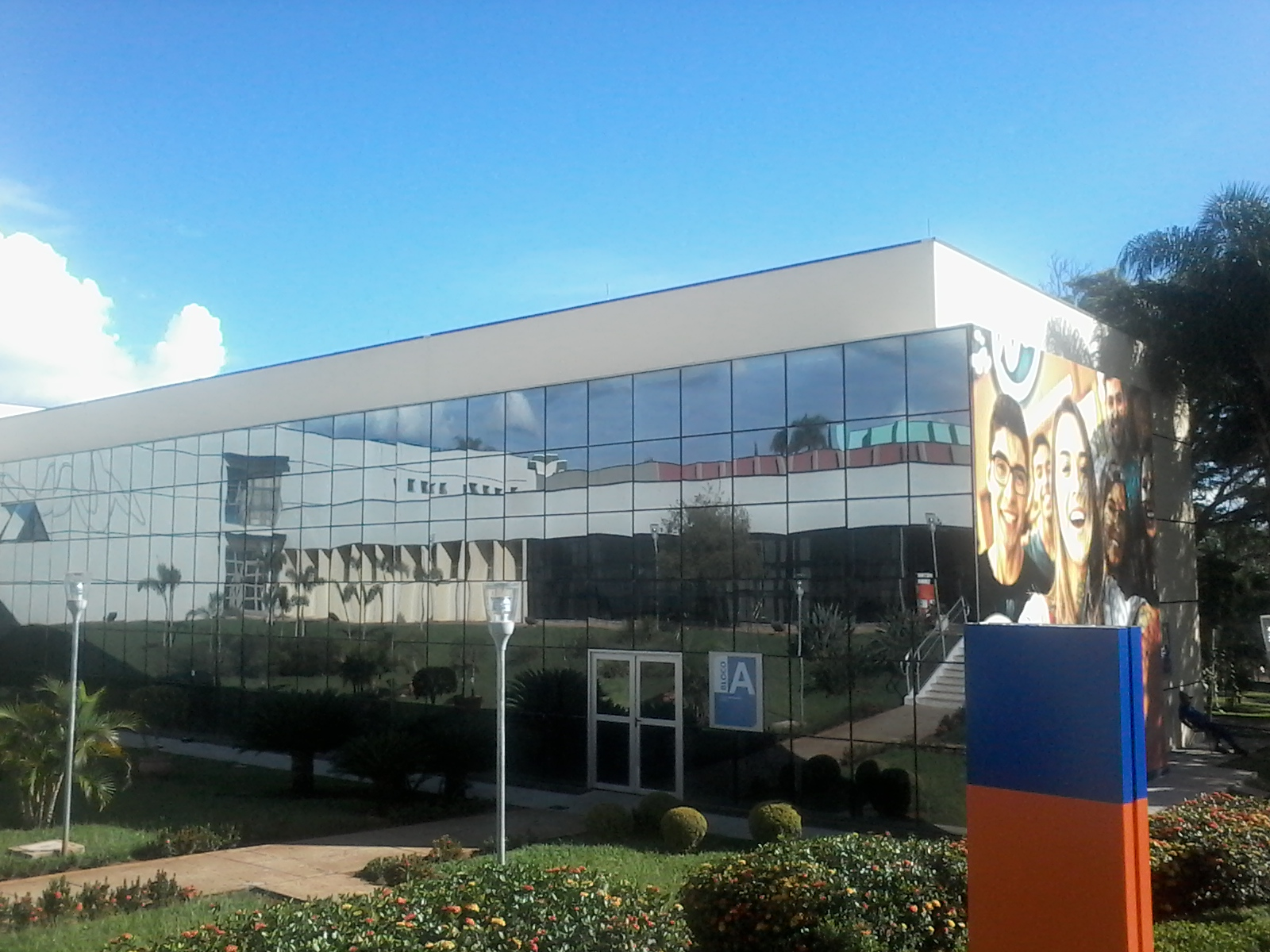 Centro Administrativo do Centro Universitário de Patos de Minas (Unipam)